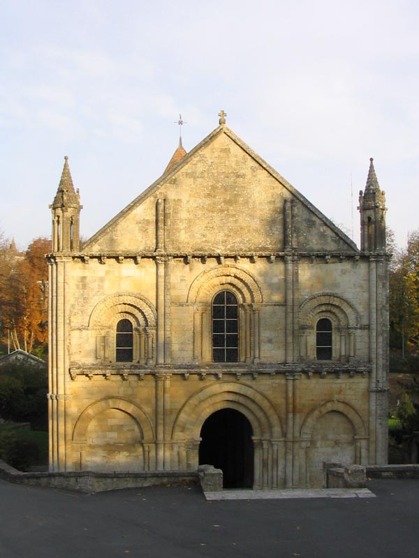 Façade de l’église de Saint Hilaire à Melle (Deux-Sèvres) en France.